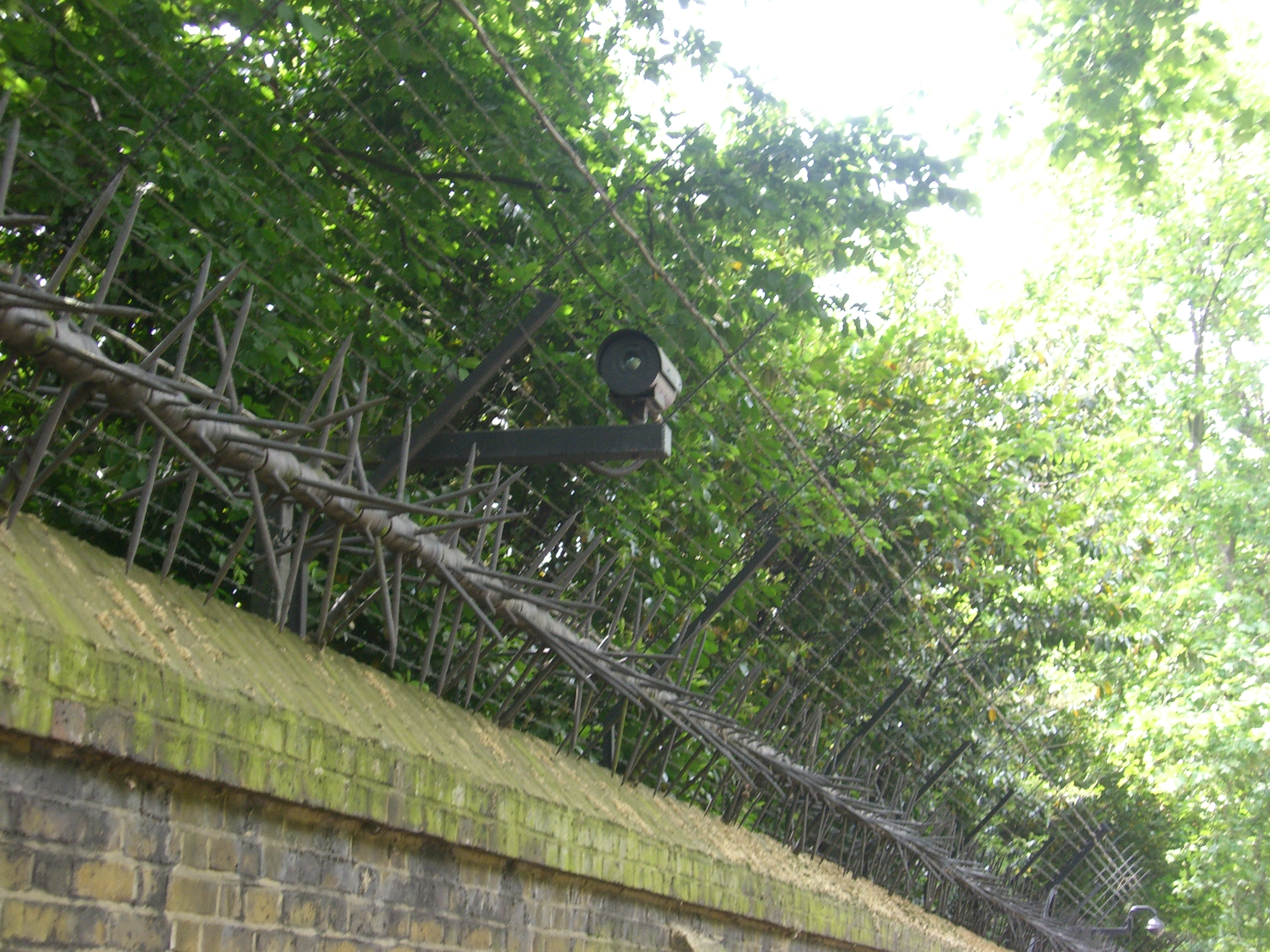 Mauer des Buckingham Palace-Grundstücks, London